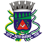 Brasão_Sete_Quedas_MS.gif